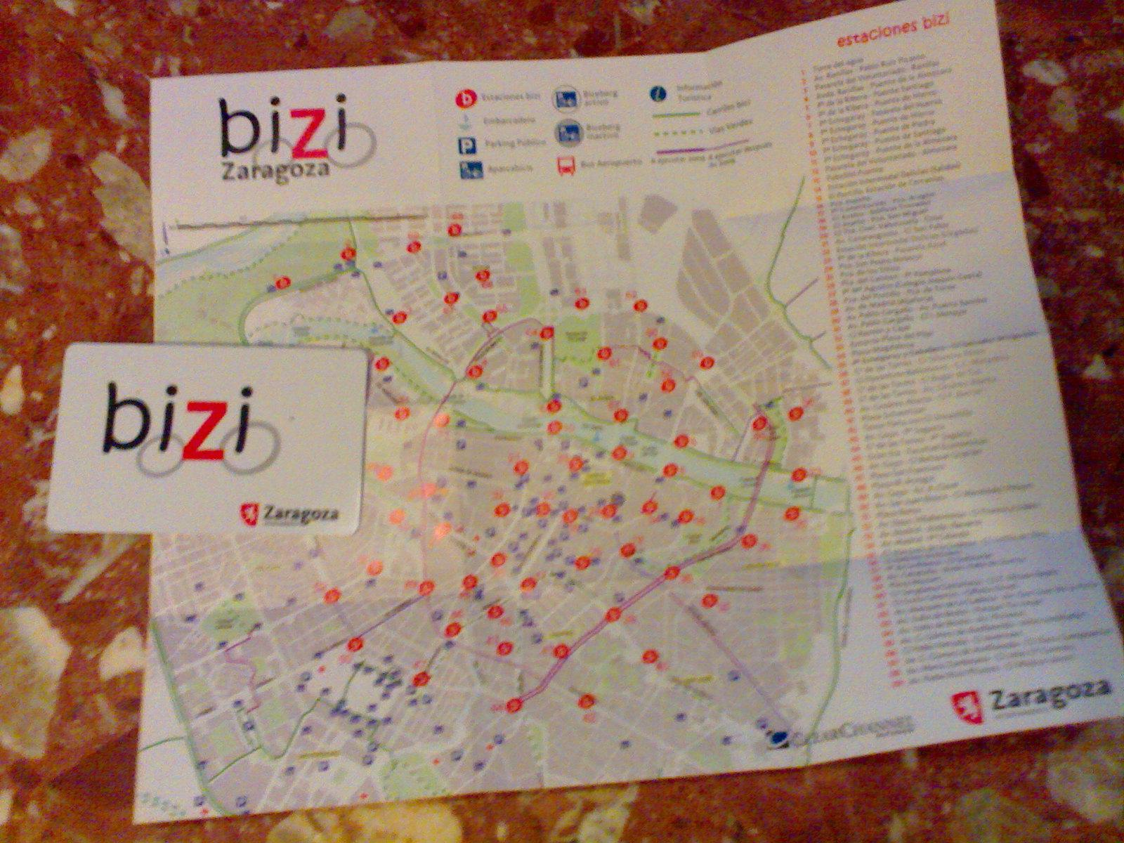 Plano y tarjeta BiZi